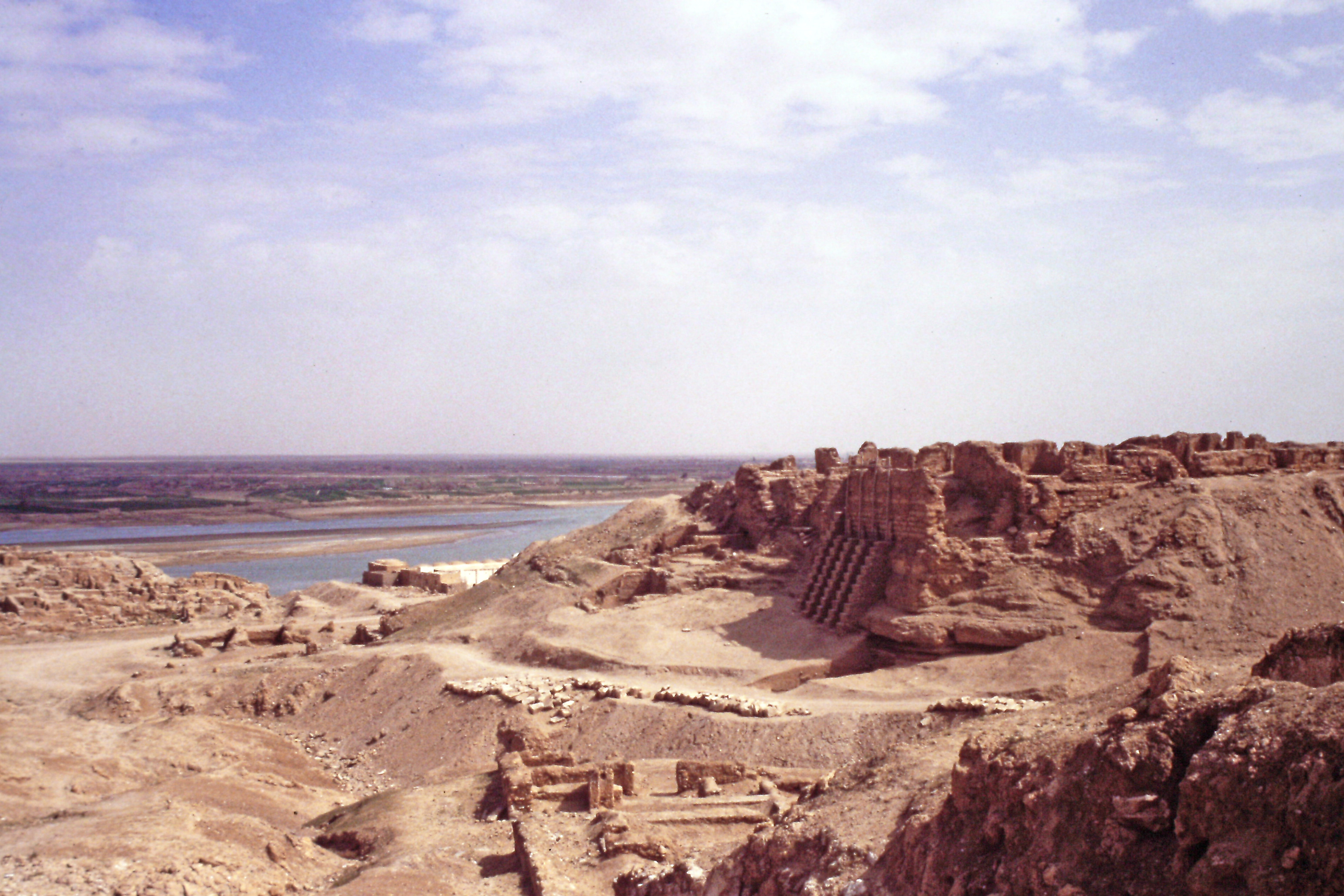 Vista sugli scavi e sull'Eufrate